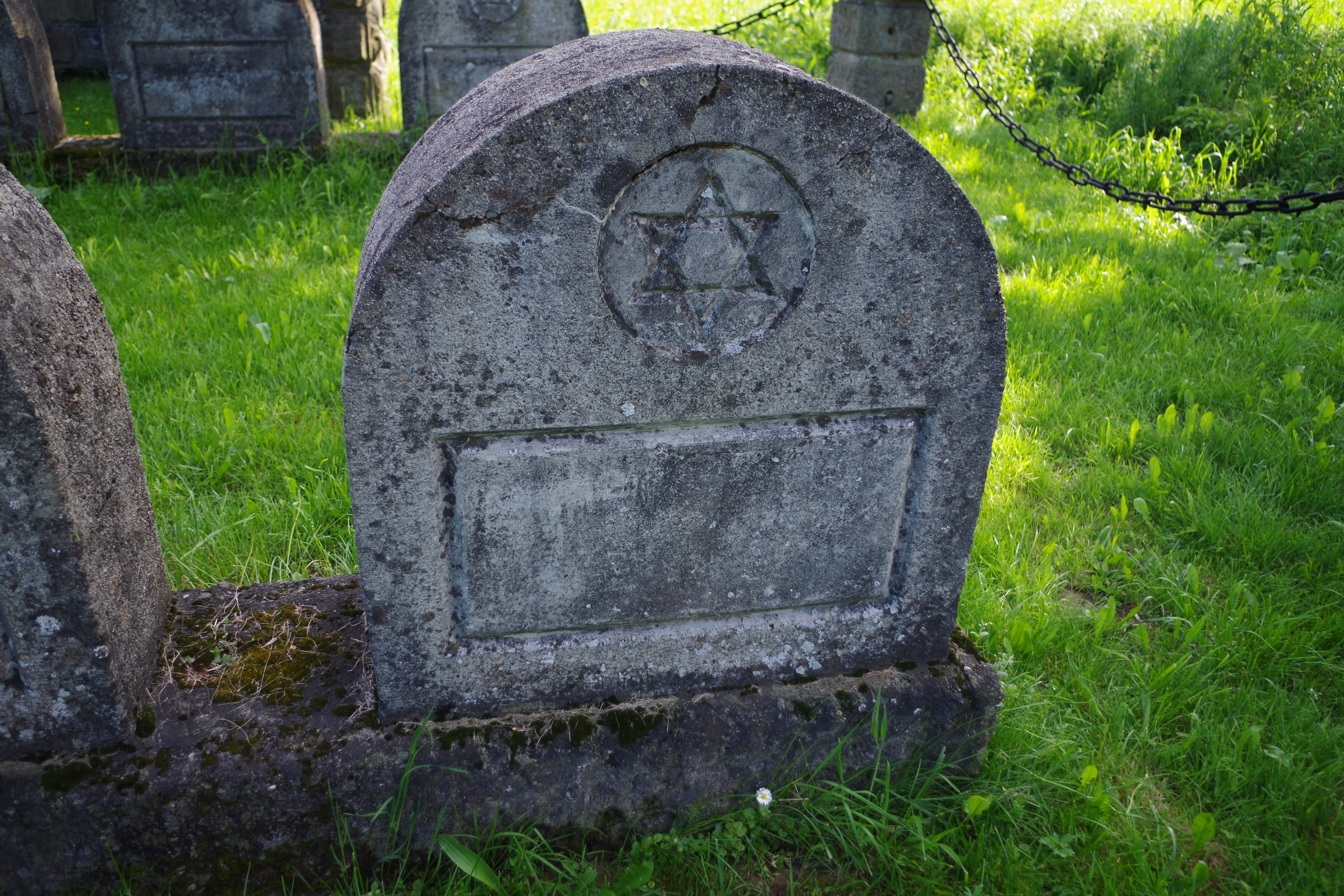 Cmentarz wojenny 293 w Zakliczynie